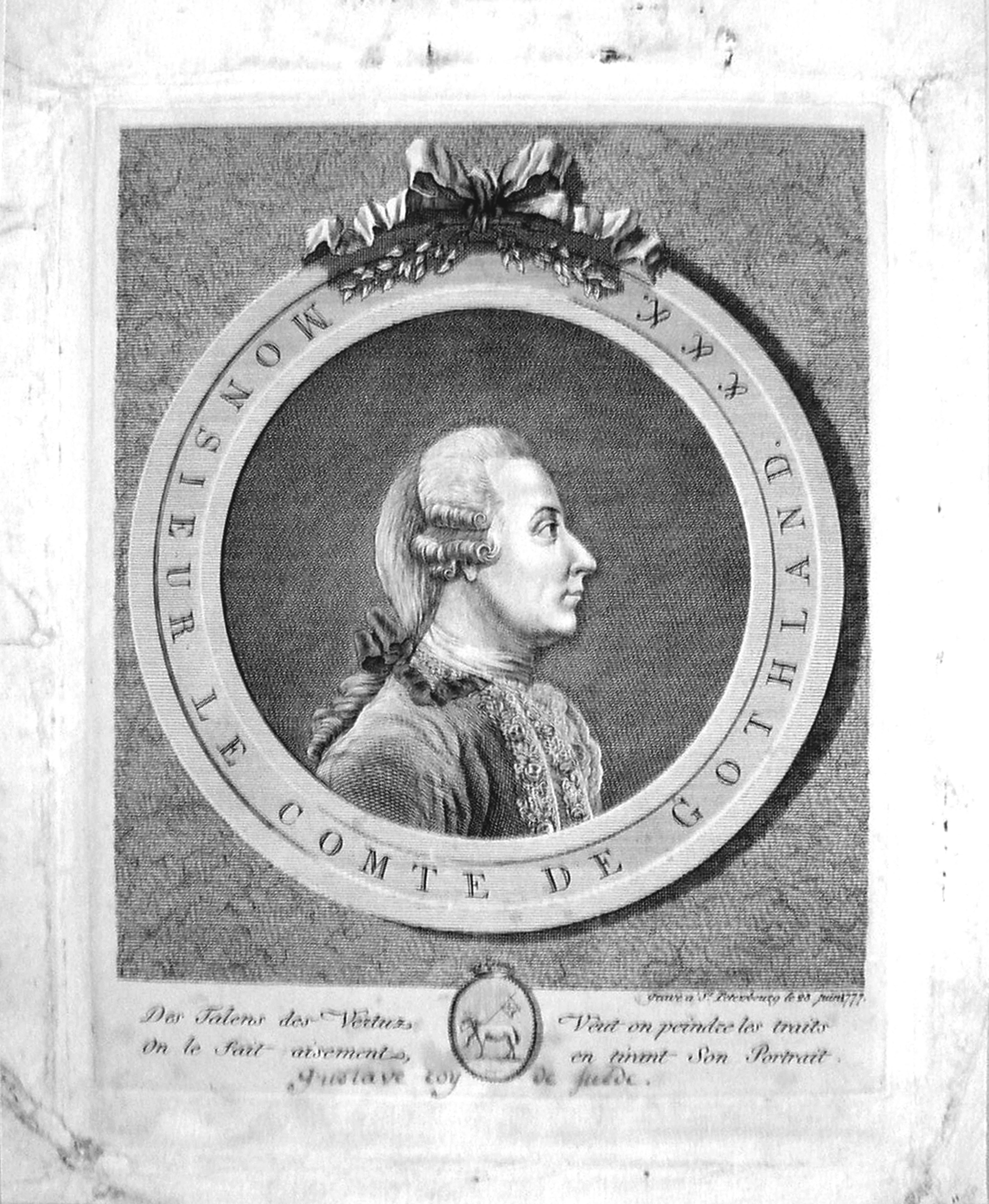 Колпашников, Алексей Яковлевич. Портрет графа де Готланд (Густава III, короля Швеции)